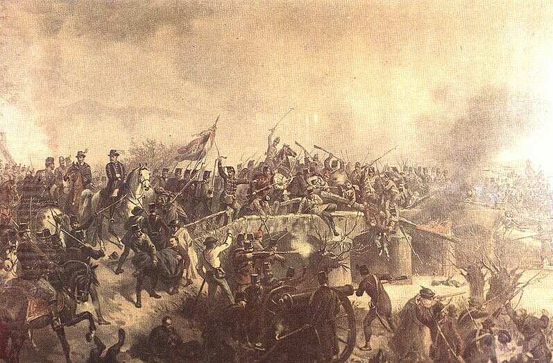 Hungarian: A piski csata (1849. február 9.)